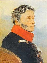 Ο Ραέφσκι το 1826